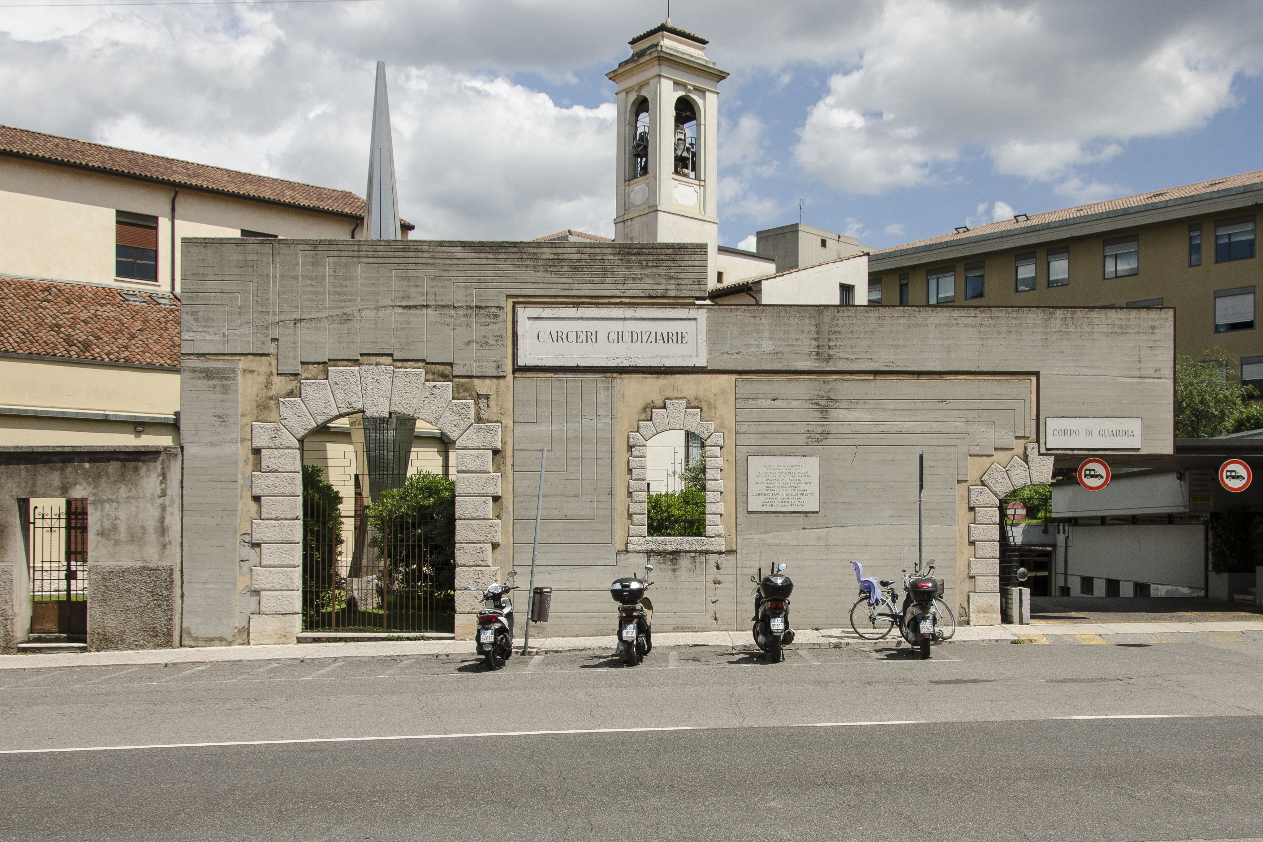 Carcere degli Scalzi, a lato dell'omonima chiesa, Verona